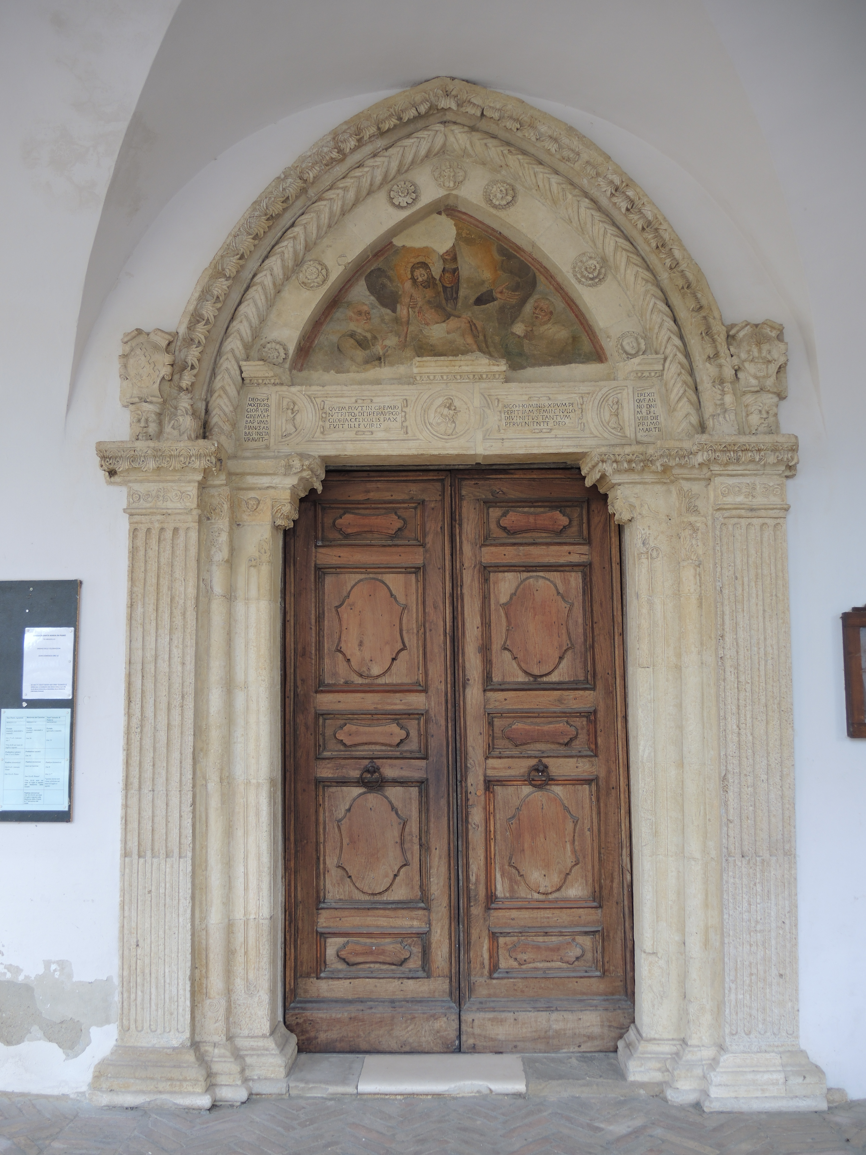 Loreto Aprutino: Chiesa di Santa Maria in Piano